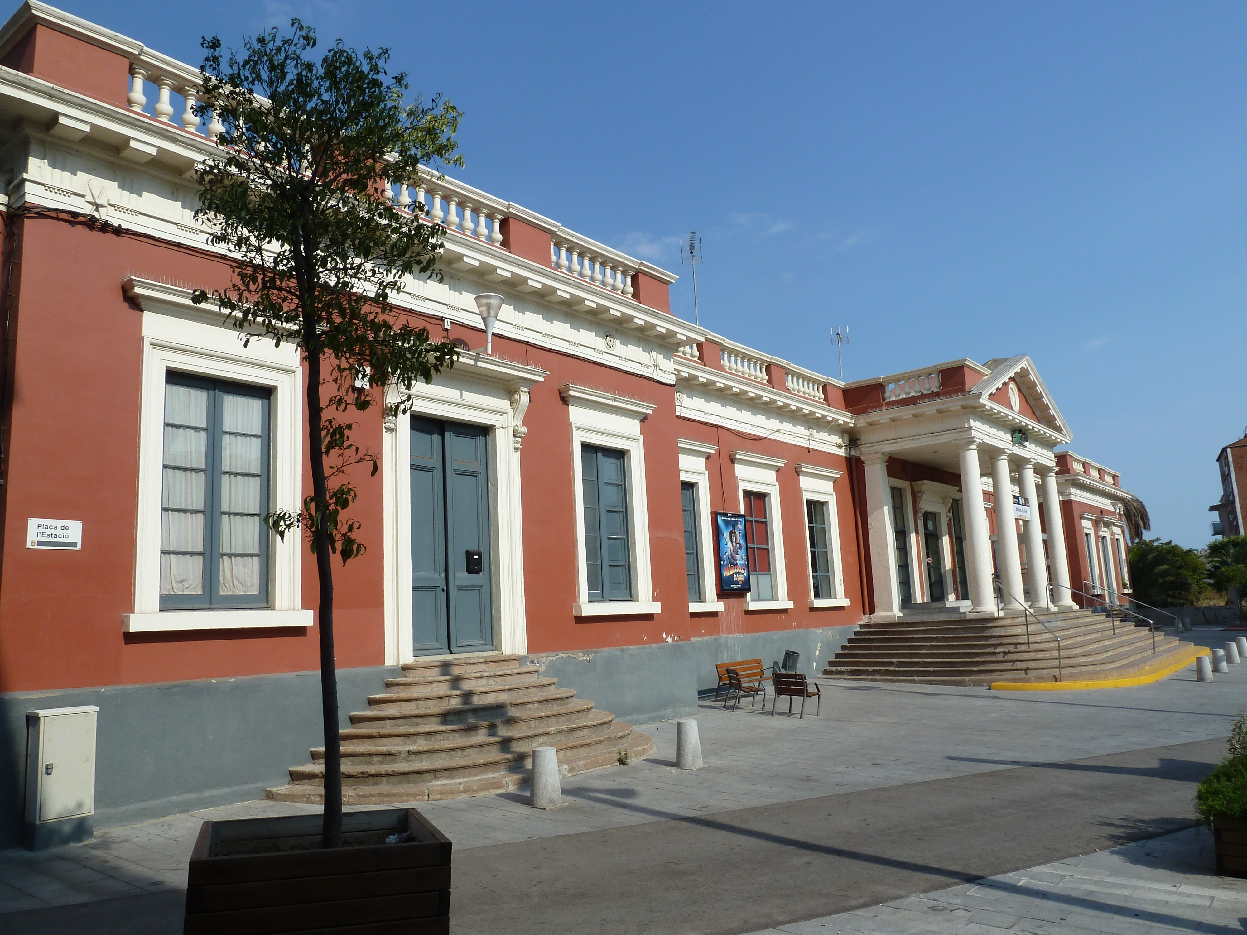 Molins de Rei